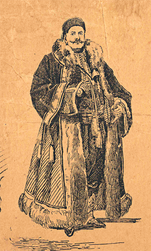 Stanojlo Petrović, savetnik knjaza Miloša